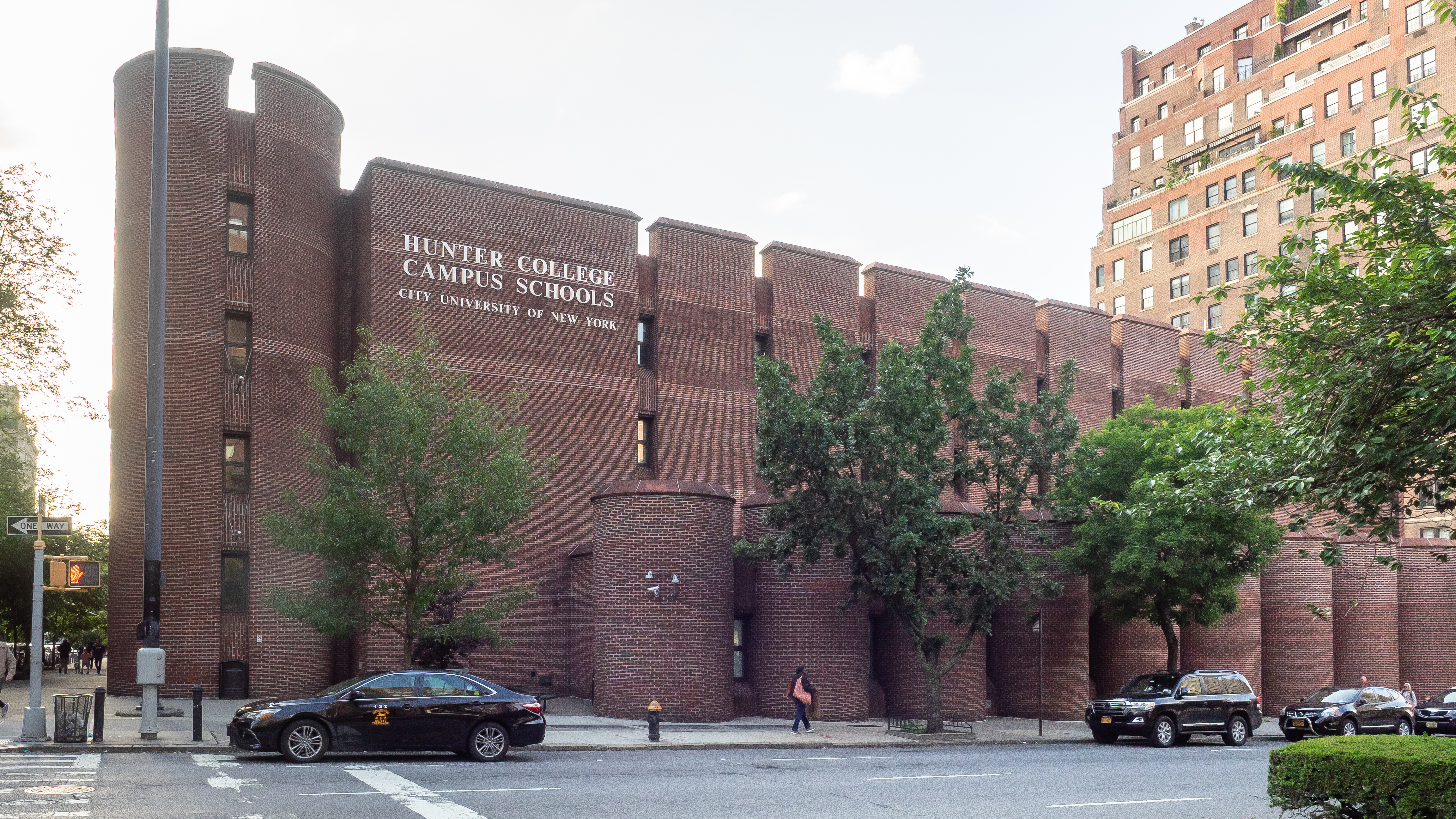 Upper East Side, NYC